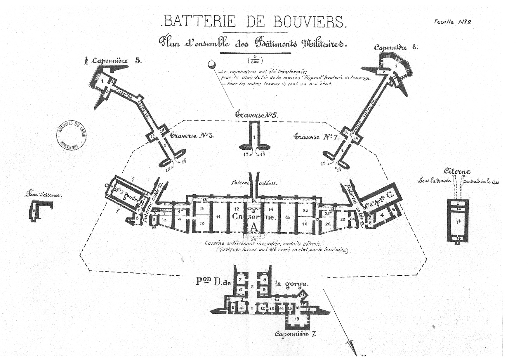 Plan d'ensemble de la Batterie de Bouviers à Guyancourt réalisé en 1880